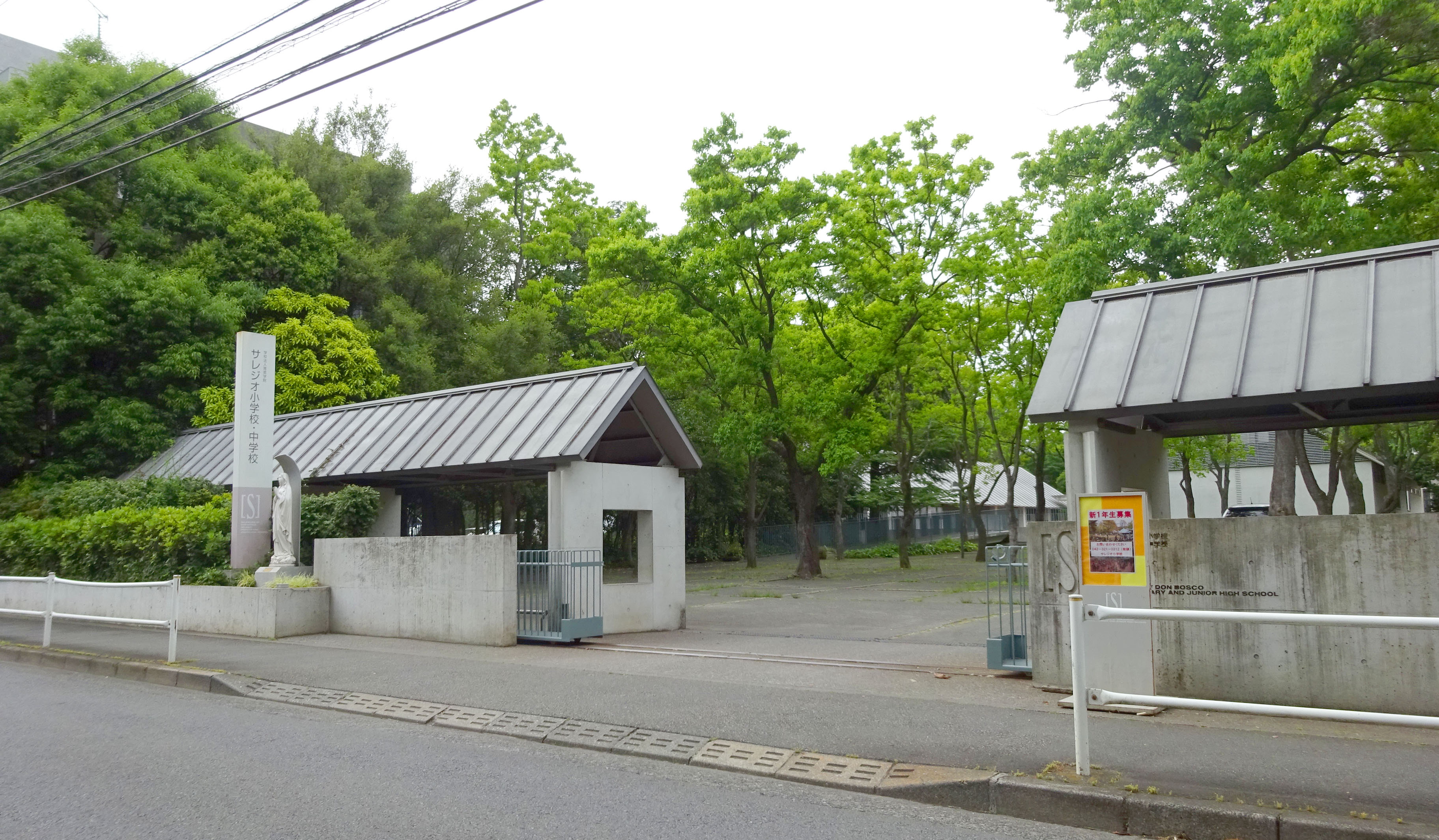 サレジオ小学校・中学校